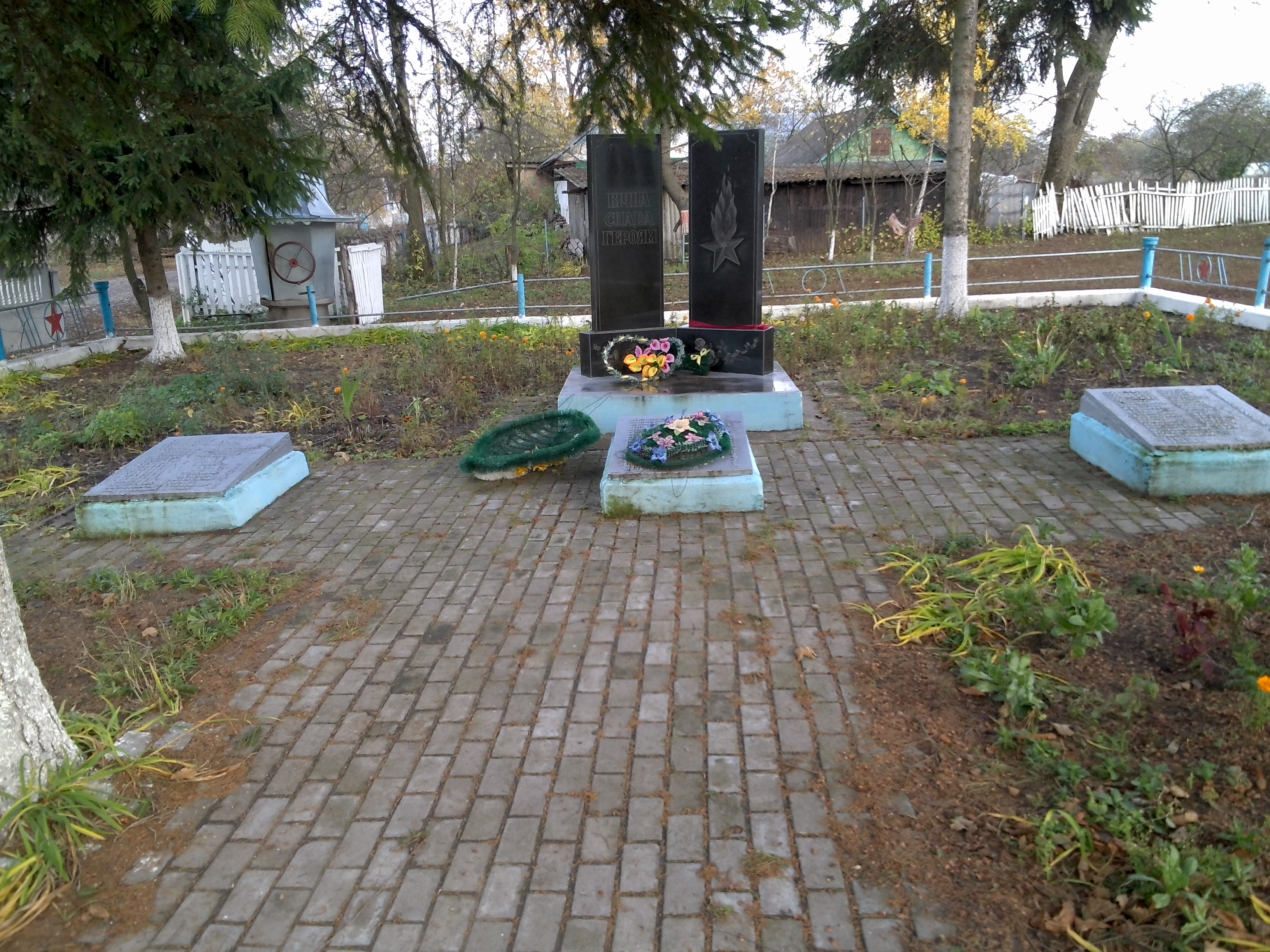 с. Вербівка. Братська могила 305 воїнів Радянської Армії, загиблих при звільненні села